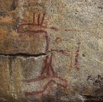 Astuvansalmen hirvikuvio lähempää kuvattuna.